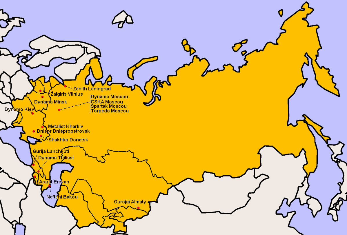 Clubs participants à la Division Supérieure 1987.